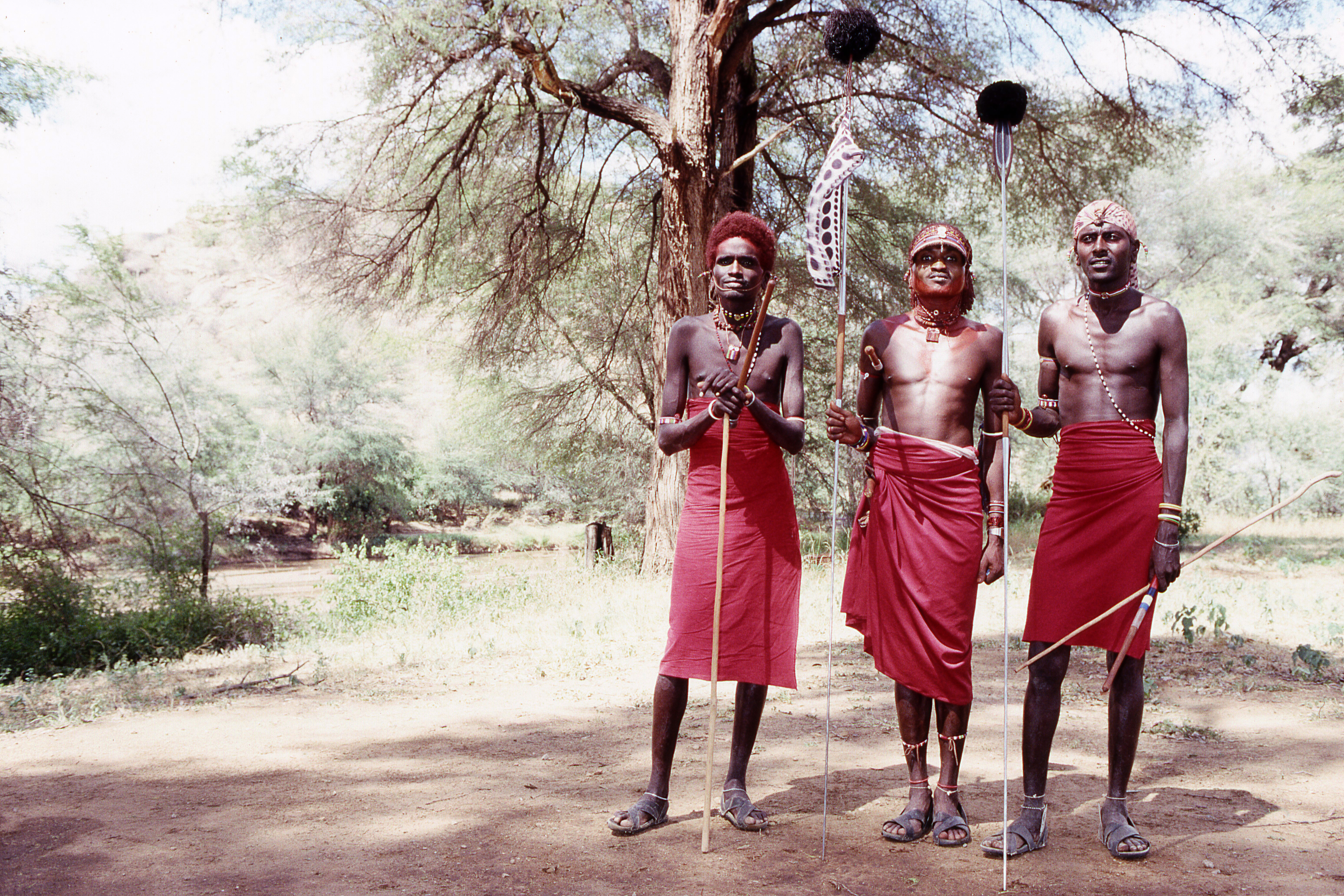 Maasai_5.jpg Maasai mara-leica R3 apo 180mm